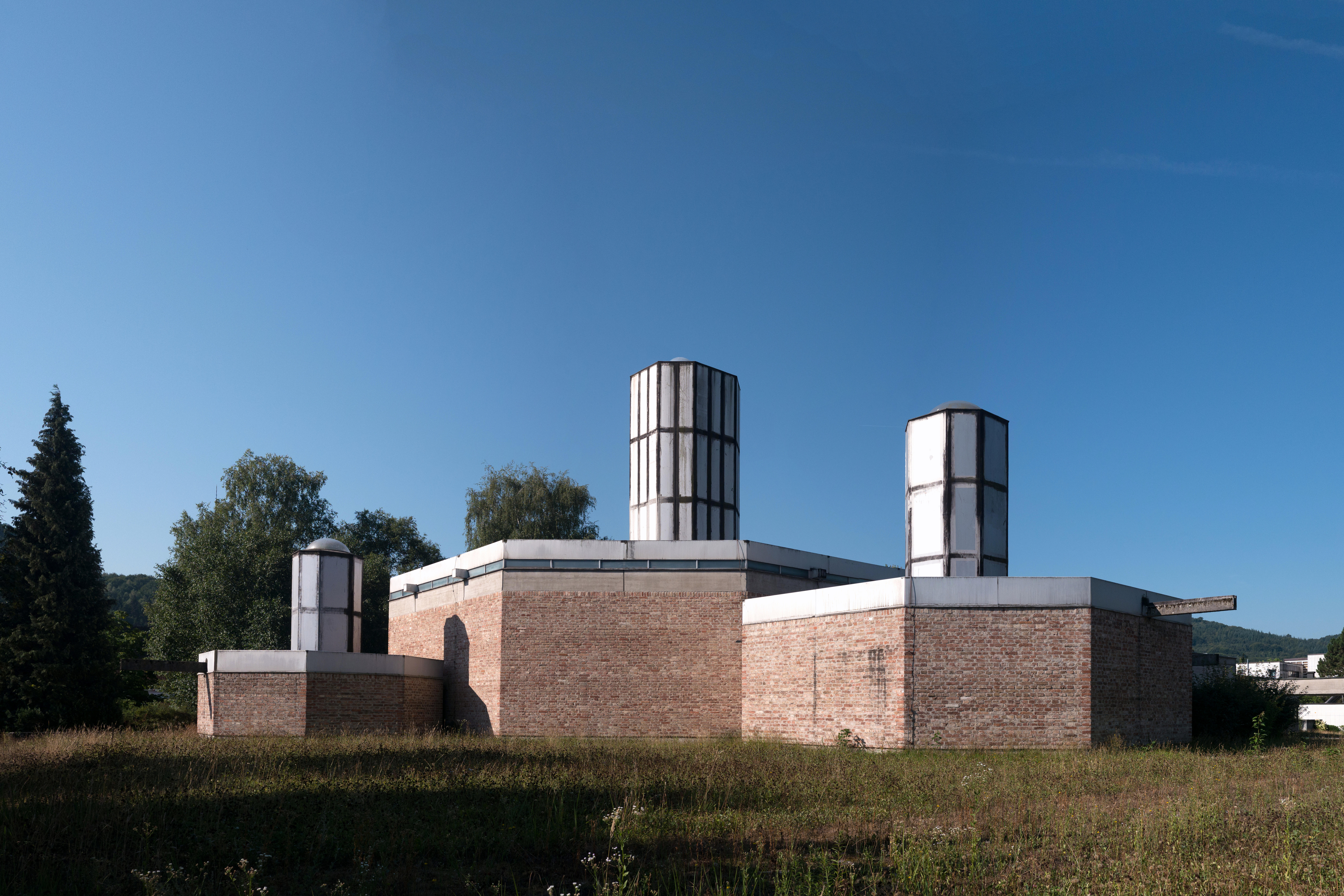 Kath. Pfarrkirche, Seelsorgezentrum hl. Andreas